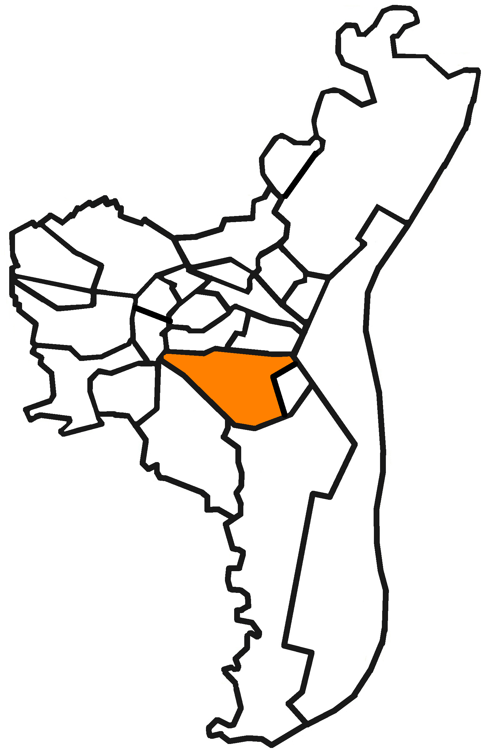 Localisation du quartier de Neudorf à Strasbourg